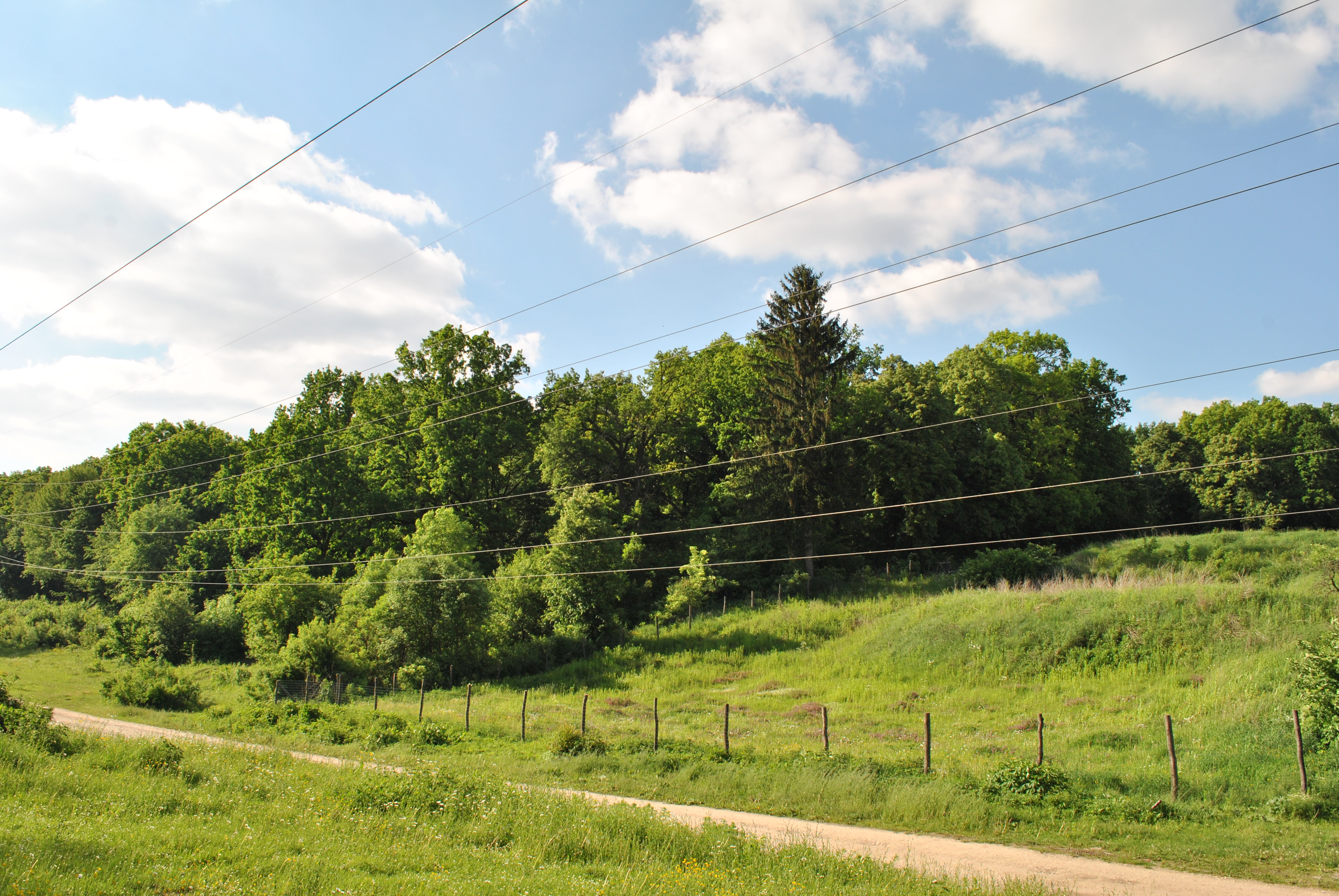 Ландшафтний заказник місцевого значення «Наші гаї» — лісові масиви в межах населеного пункту с. Великі Гаї Тернопільського району Тернопільської області.